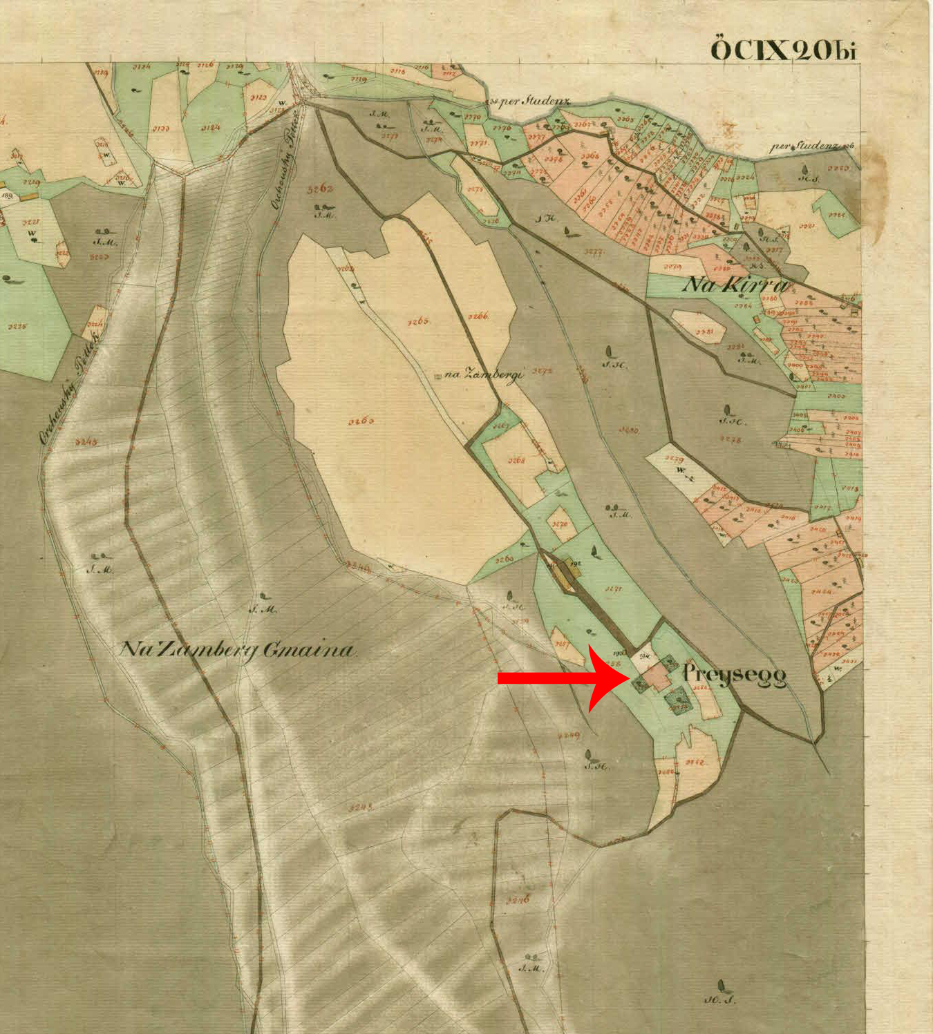 Franciscejski kataster za Kranjsko, 1823-1869